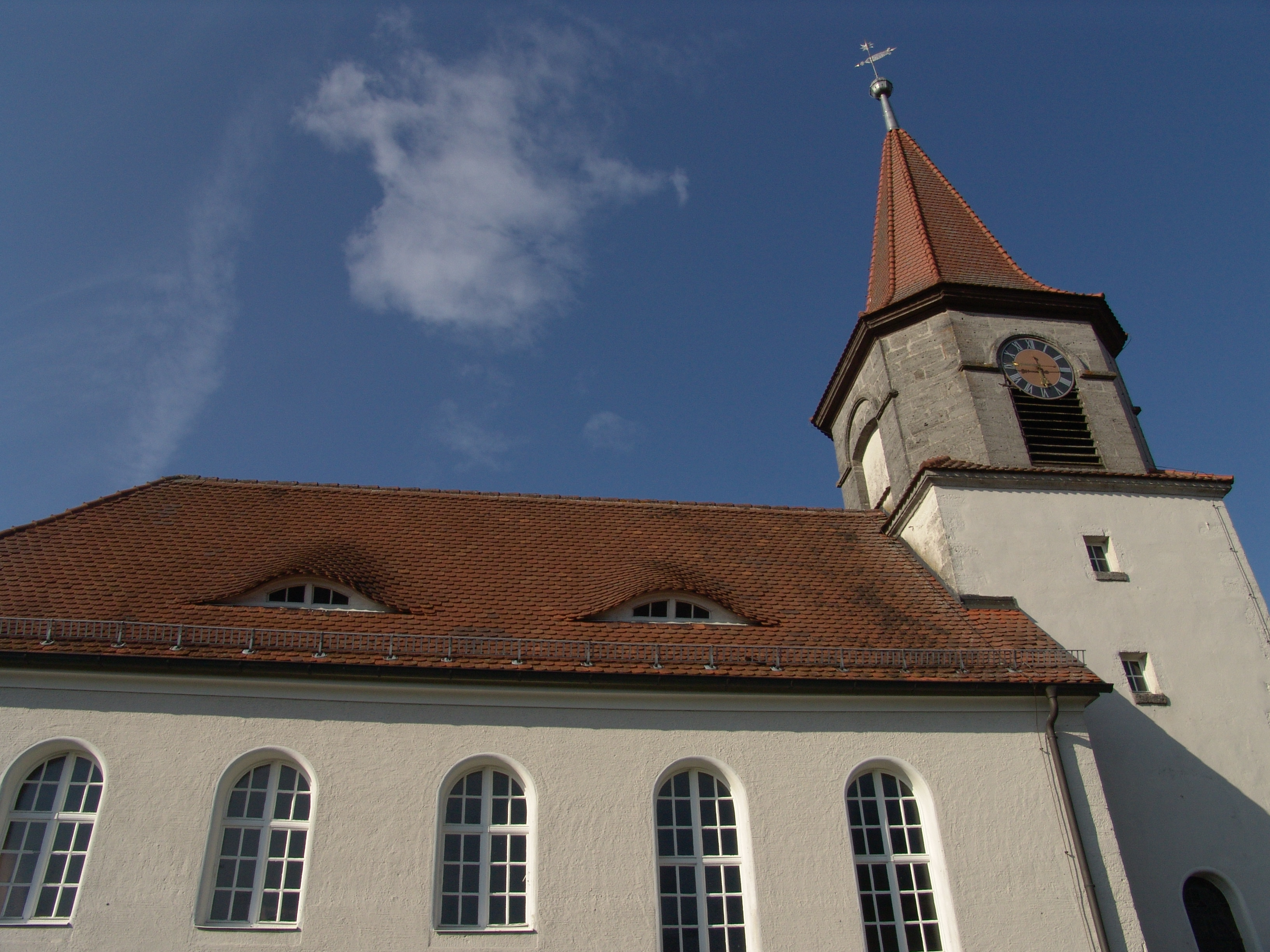 evang.-luth. Michaelskirche in Larrieden